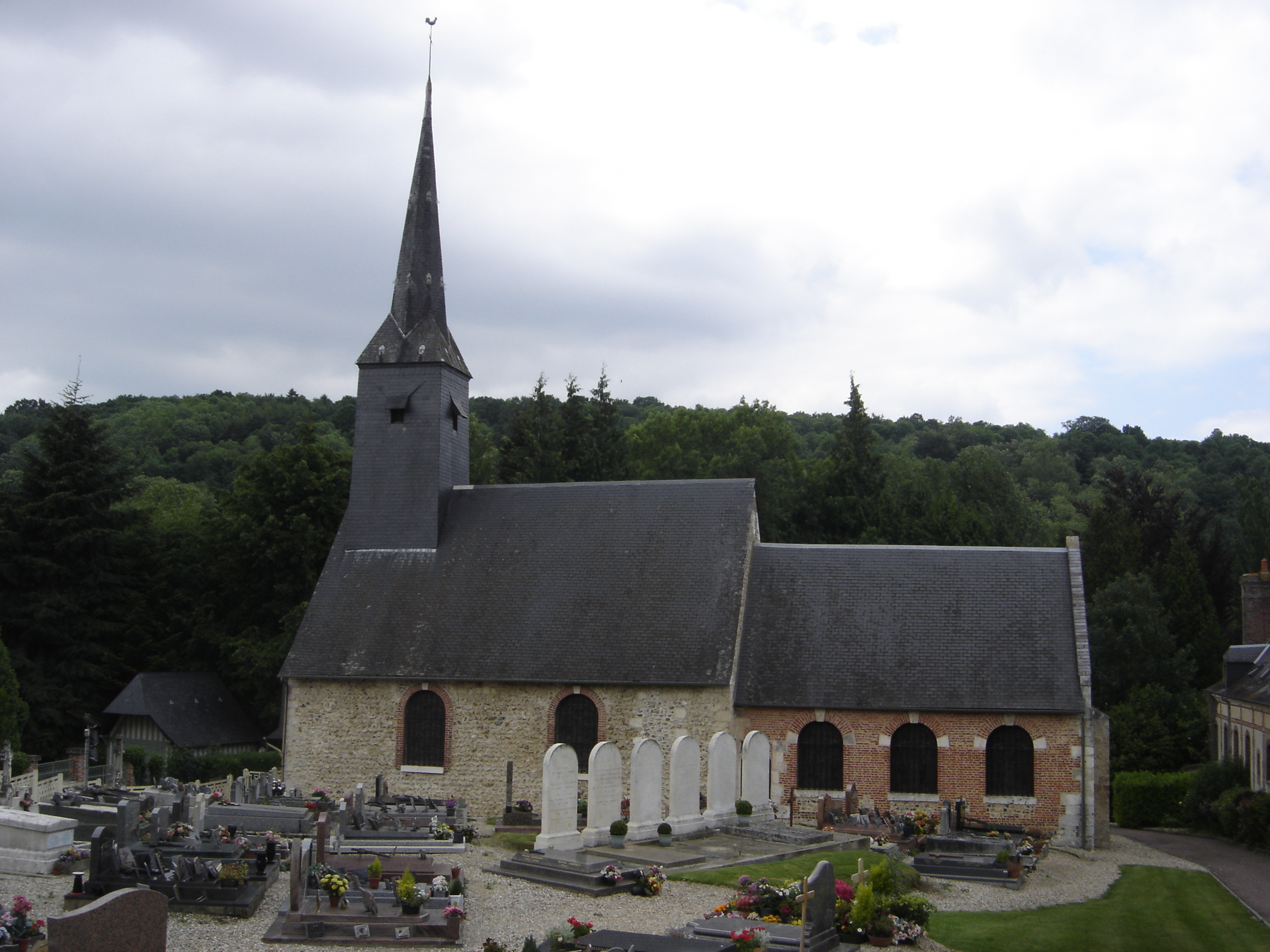 église de Tourville sur Pont-Audemer (Eure - France)